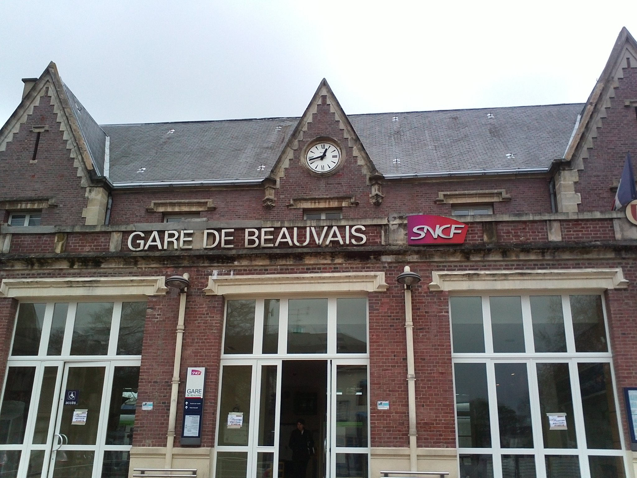 Gare de Beauvais-2012